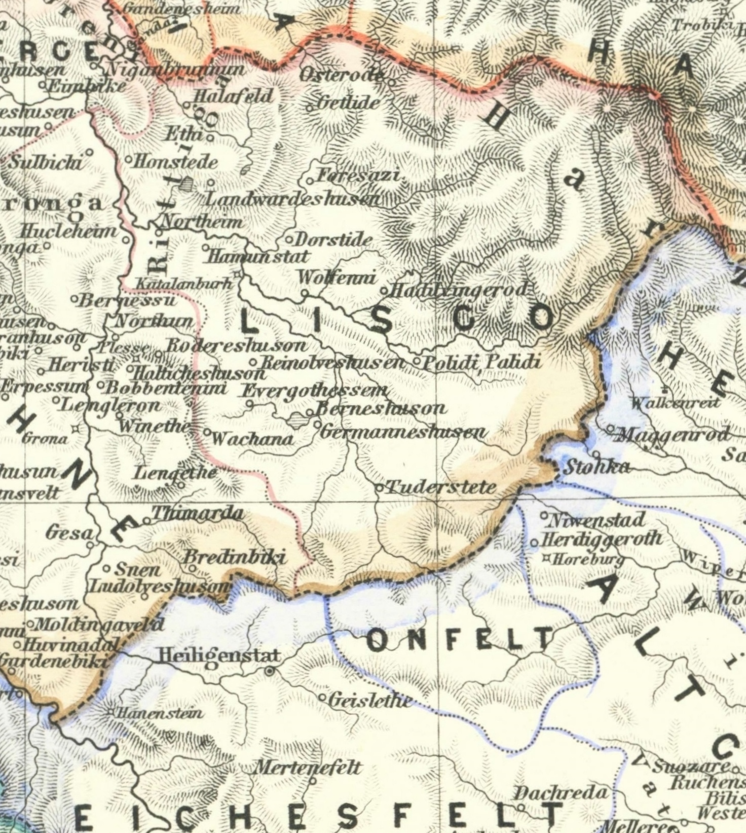 Deutschlands Gaue III: Sachsen, Nördliches Thüringen: Kartenauschnitt Liesgau